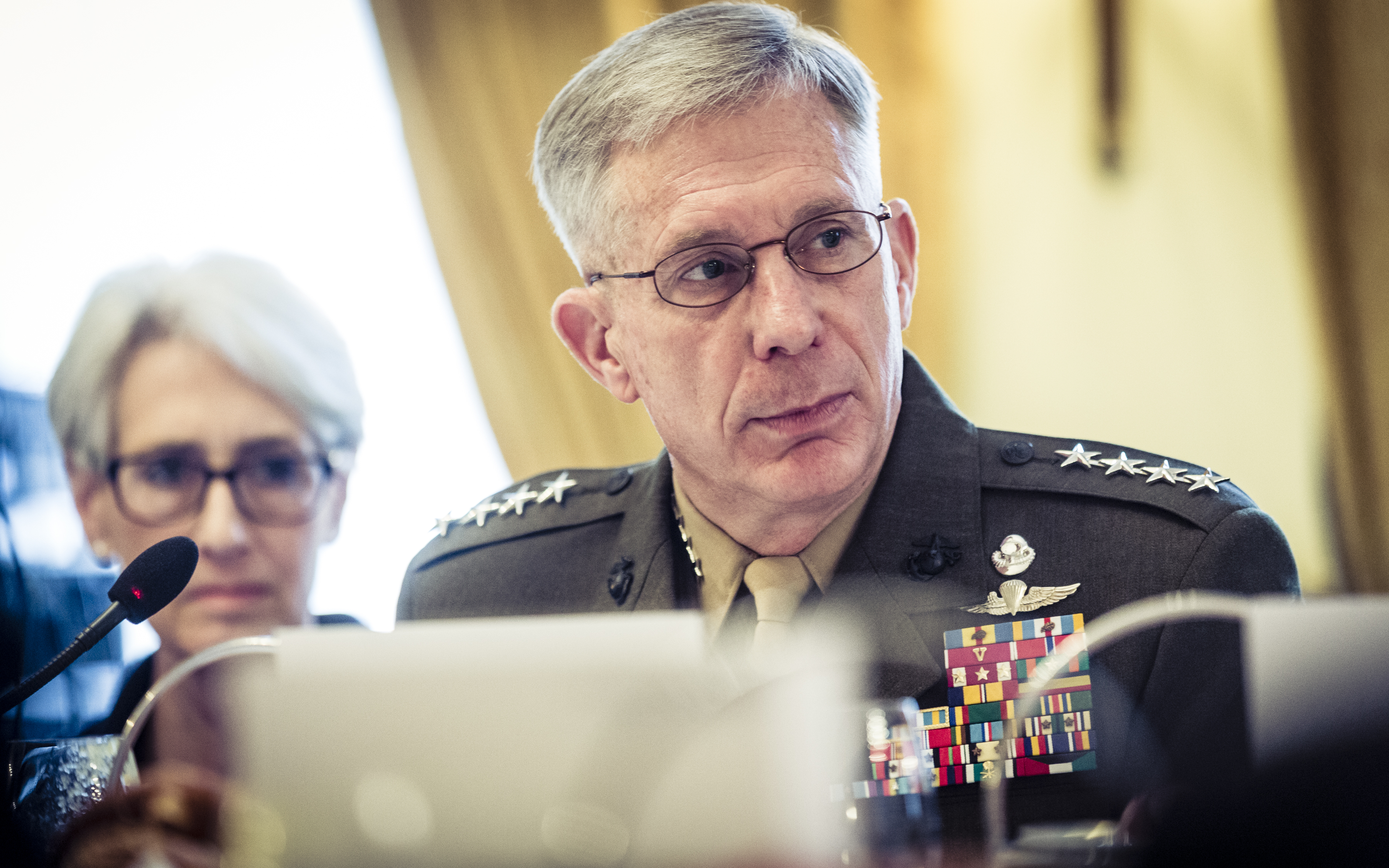 Thomas D. Waldhauser während der Münchner Sicherheitskonferenz 2017